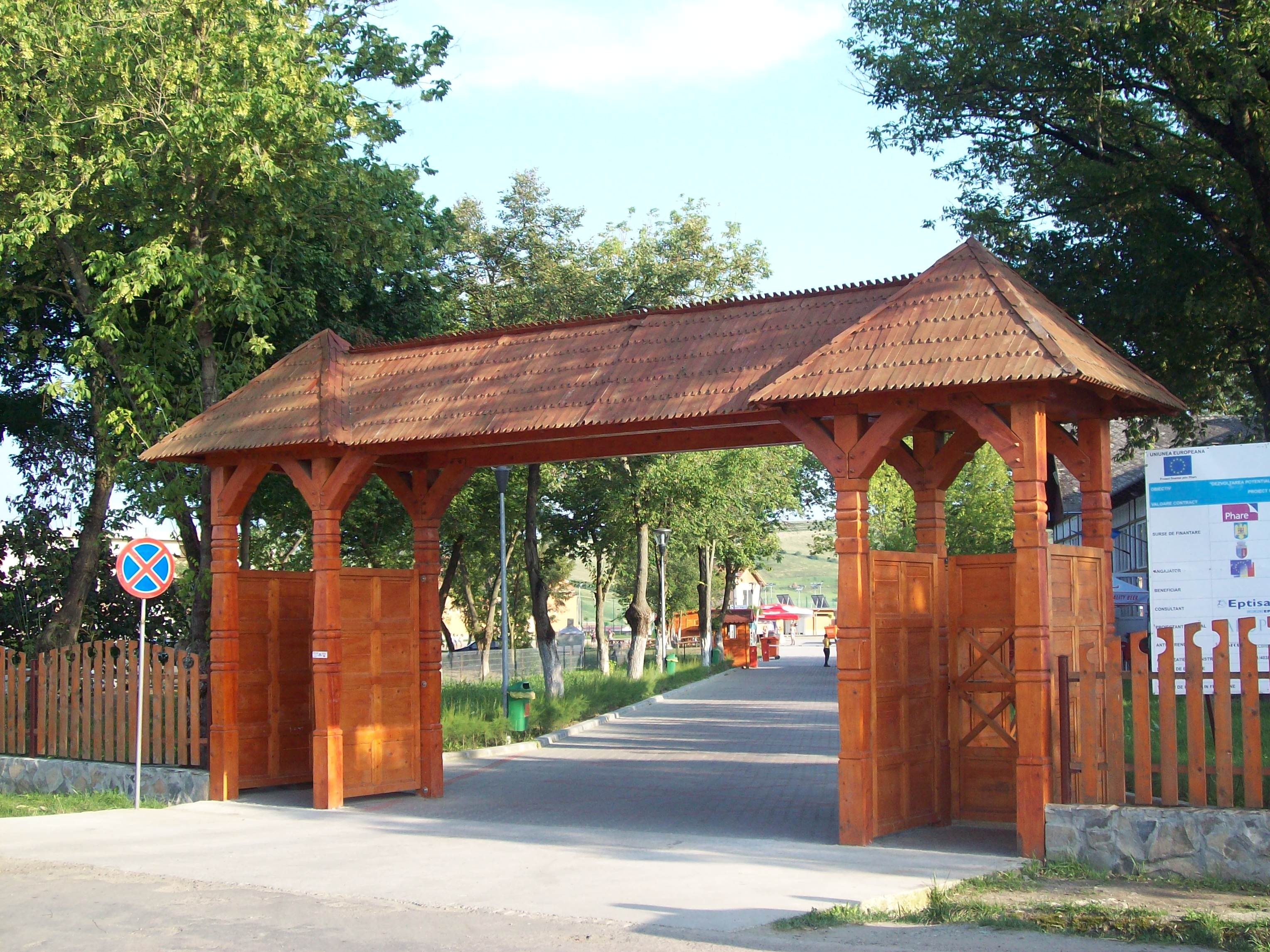 Intrarea la băile Cojocna, judeţ Cluj (România)